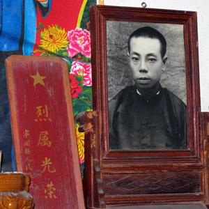 袁文才终获平反，他的家属也得到政府颁发的“烈属光荣”牌。